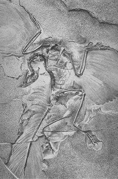 Archaeopteryx, Berlin